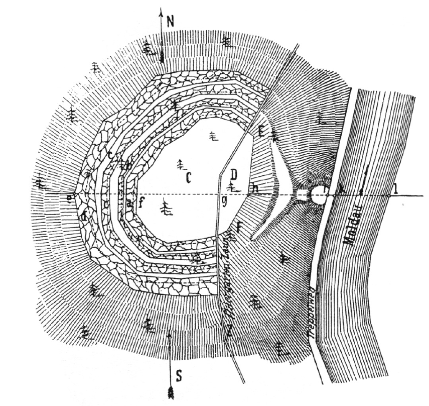 Půdorys hradiště Baba z roku 1883